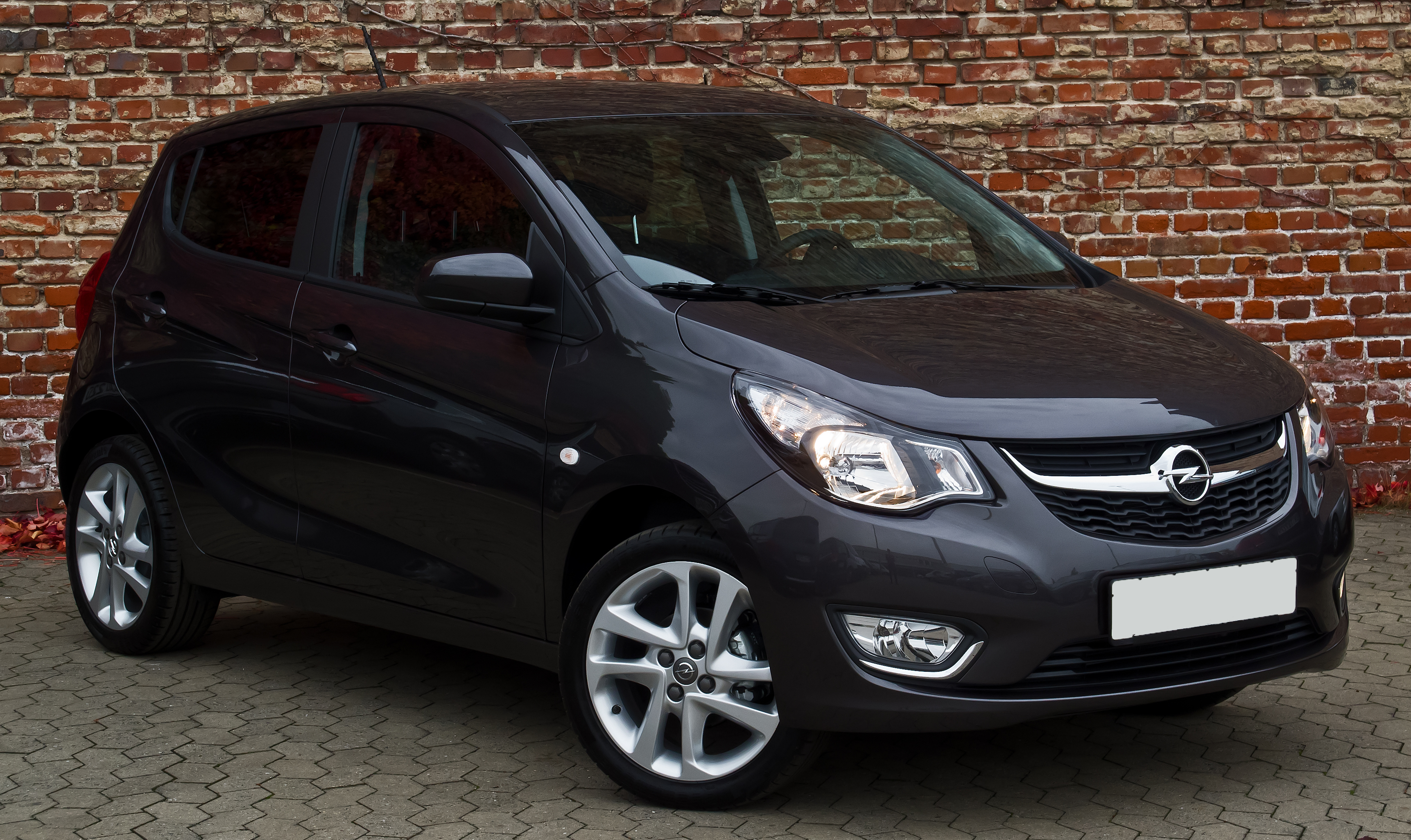 Opel Karl 1.0 ecoFLEX Exklusiv